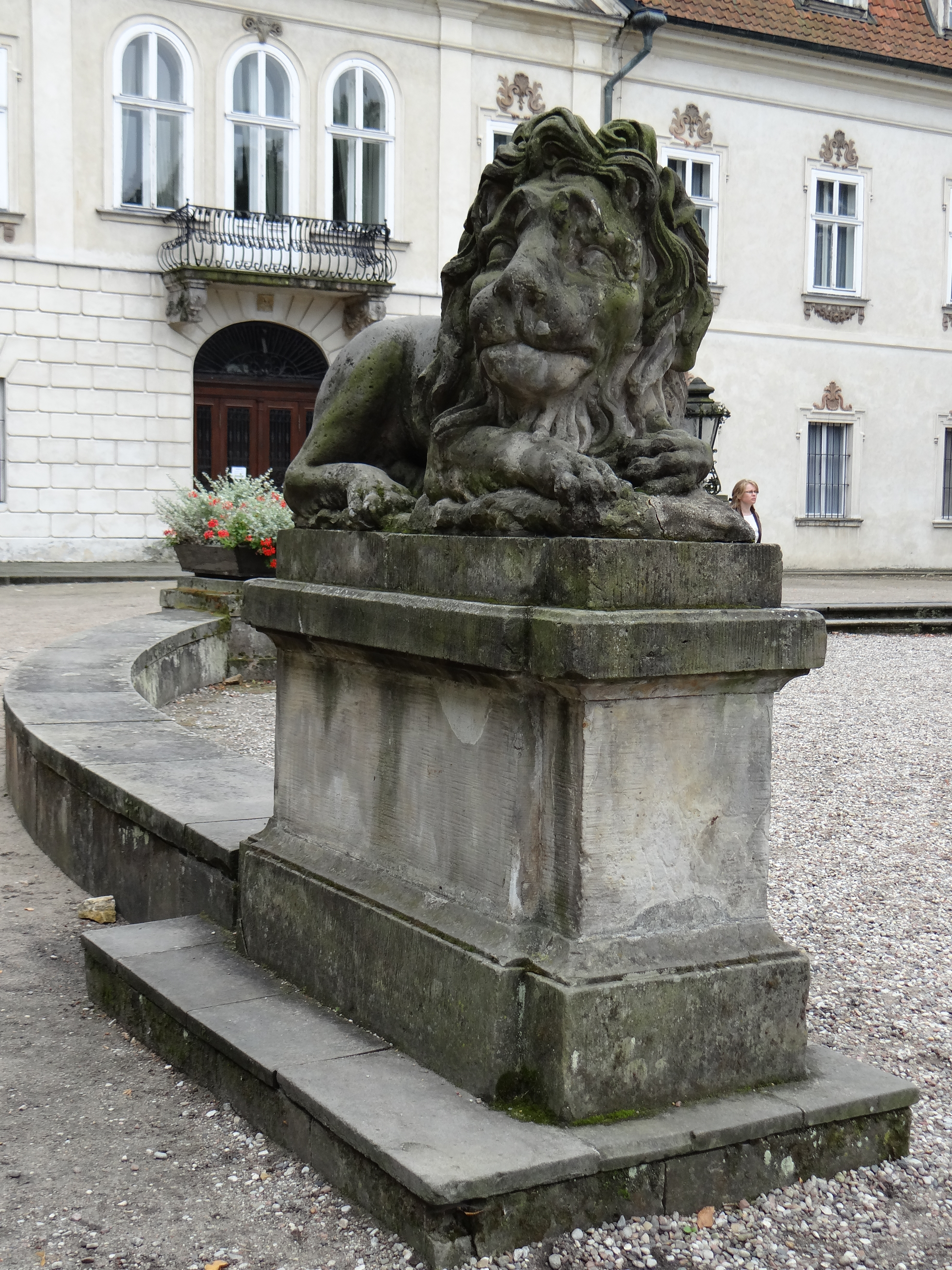 Lwy w parku a Nieborowie